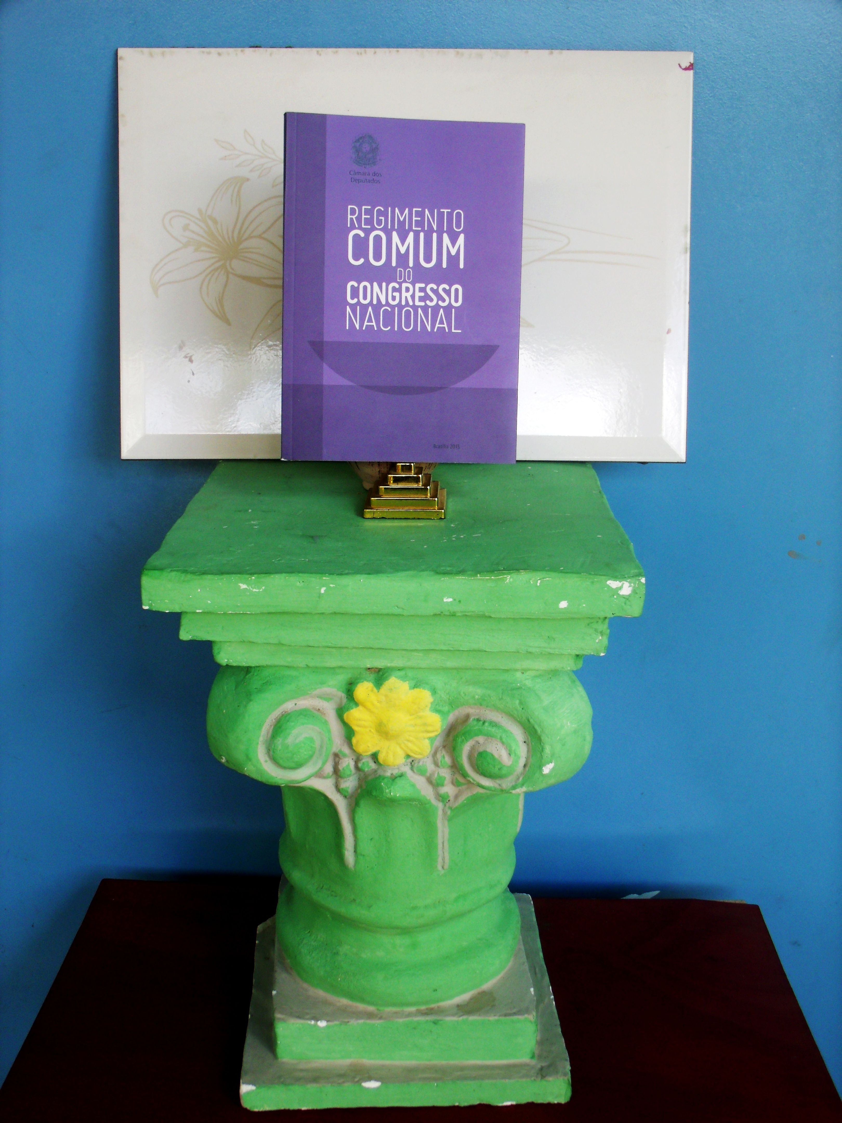 Coluna clássica servindo para exposição do Regimento Comum do Congresso Nacional do Brasil.